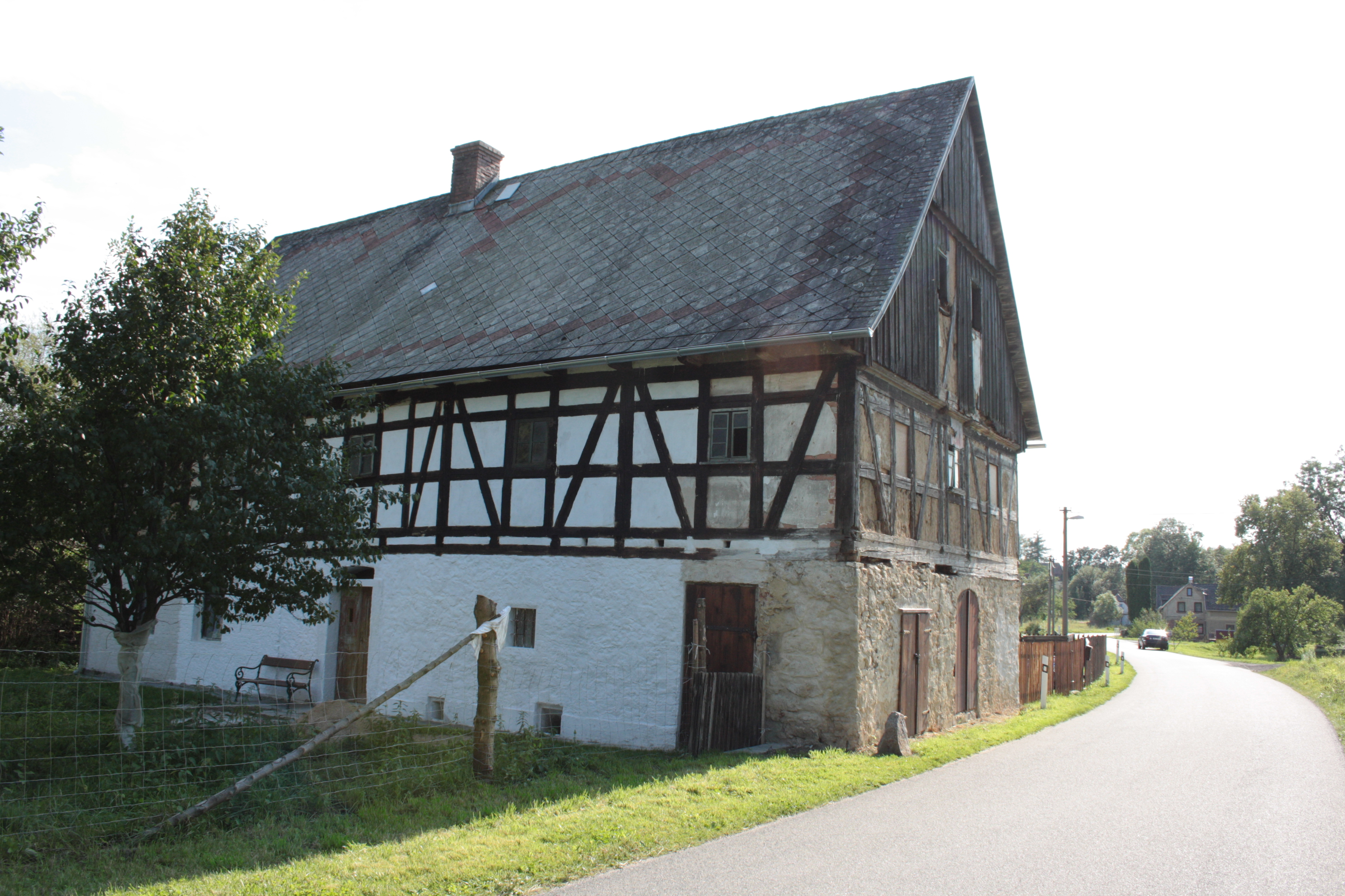 Dům číslo popisné 198 v Dolních Pertolticích (pohled od západu).